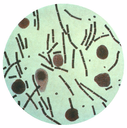 Bacillus anthracis in einer Hiss-Kapselfärbung